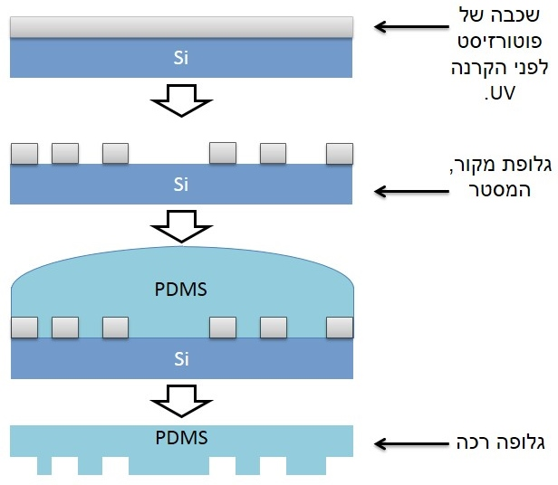 בניית גלופת מקור - המסטר, ויצירה של גלופה רכה מ- PDMS, החותמת.